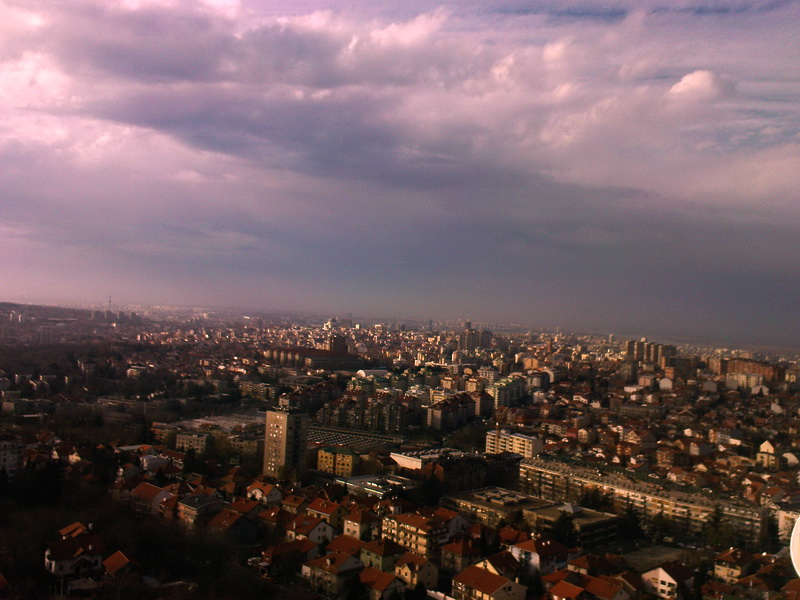 Konjarnik